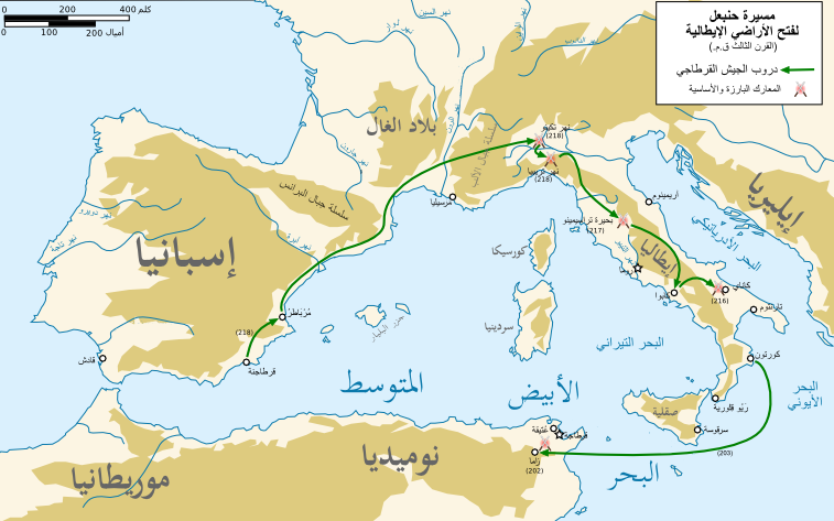 خارطة باللغة العربية تُظهر الدرب الذي سلكه حنبعل (هنيبعل) بجيوشه لغزو روما.